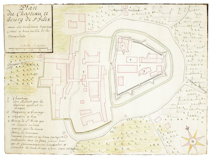 Cartografia monoscritta di San Felice sul Panaro (San Felix), vicino a Mirandola in provincia di Modena. Sono descritti il piano della città e del castello, i fossati intorno ad essi, i sentieri, i campi e alcune case al di là della recinzione. Questa mappa è stato realizzata durante la guerra di successione spagnola, nel momento in cui le truppe francesi, sotto il comando del duca di Vendome, stavano facendo la campagna in Piemonte. Era stato addestrato da e per i militari. Sono indicati i foraggi, i negozi di legno e le opere di restauro delle fortificazioni della cittadina.